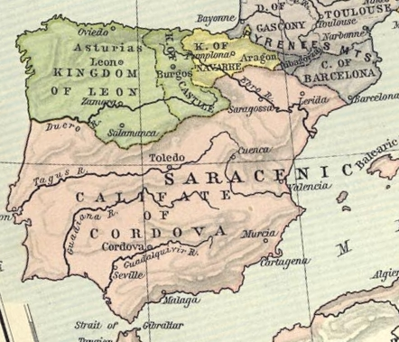 España el año 1000. Este mapa contiene al menos un error. El Reino de Castilla (K. of Castille) no existía el año 1000.